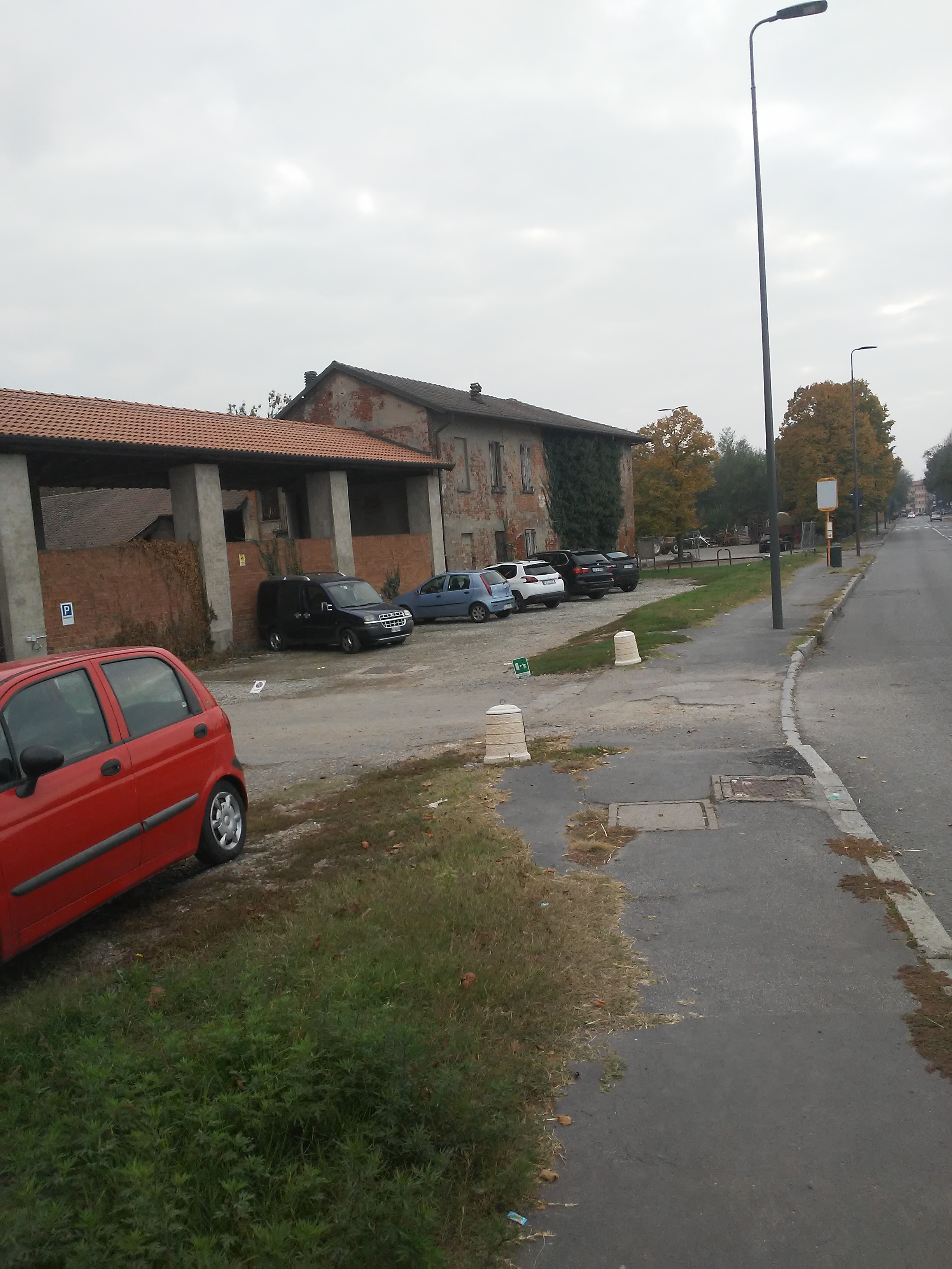 Lumbaart: Panorama de la Cassina Caldera